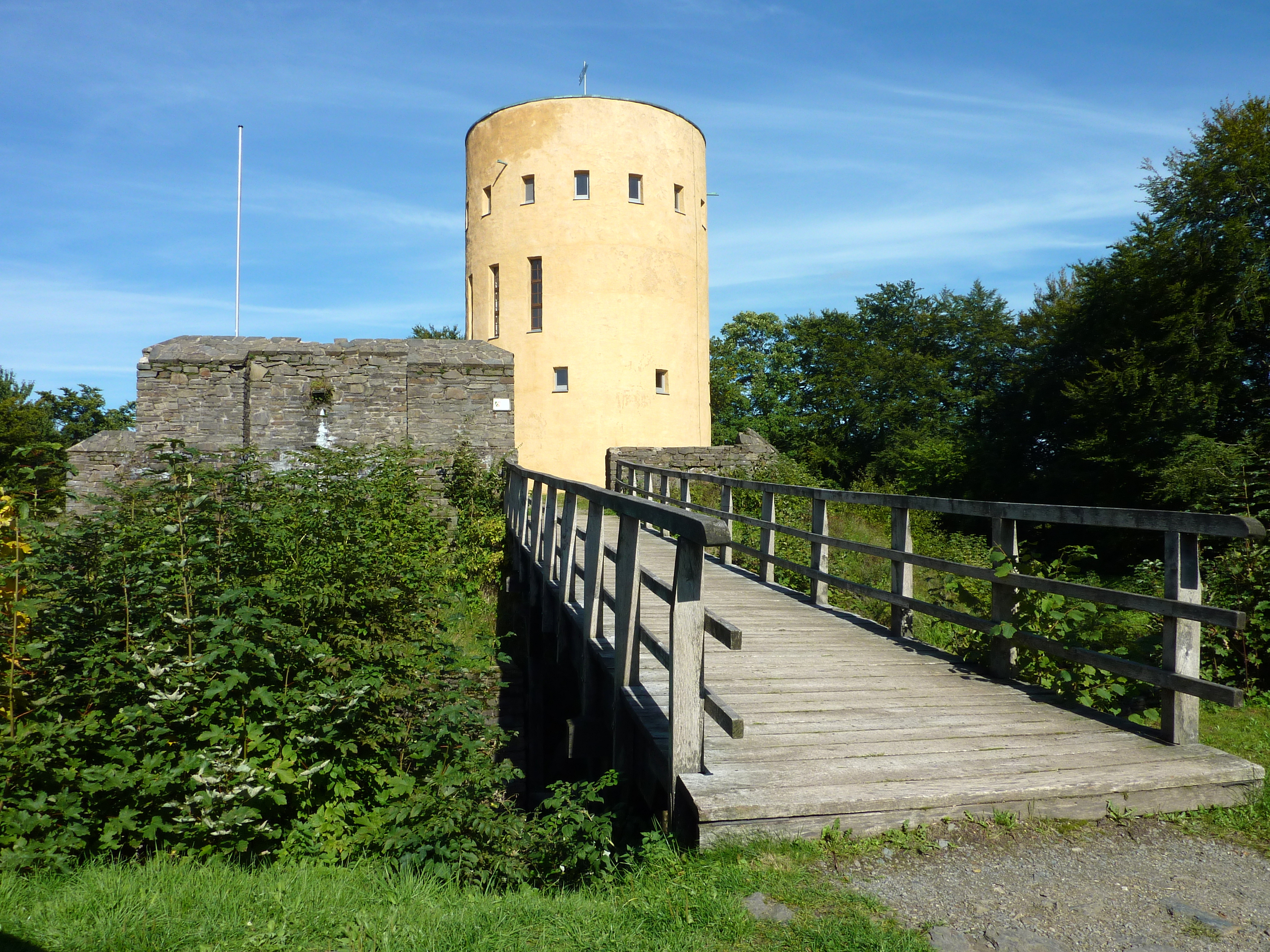 Gemeinde Grund (Hilchenbach)/Westfalen: Die Ginsburg-Ruine, vom 13. bis 17. Jahrhundert Grenzfestung des Hauses Nassau auf dem Schlossberg, Ansicht von Südwesten. Links im Bild ein Teil des rekonstruierten äußeren Mauerrings. In der Bildmitte der in den Jahren 1967/68 erbaute Aussichtsturm, den ehemaligen Bergfried nachahmend und auf dessen etwa aus dem Jahr 1200 stammenden Fundamenten errichtet. Im Vordergrund eine in der Gegenwart errichtete Holzbrücke über den Burggraben.